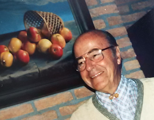 Lodewijk Karel Bruckman